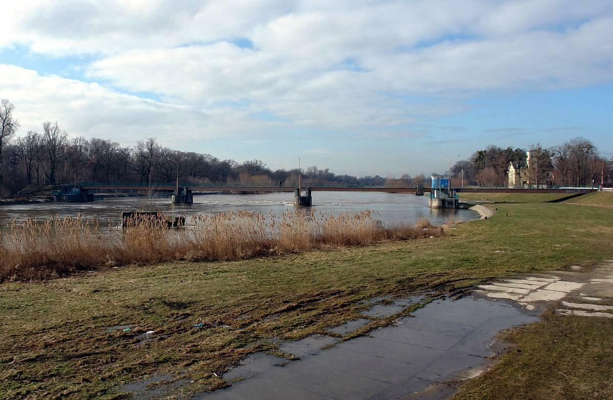 Jaz Opatowice.